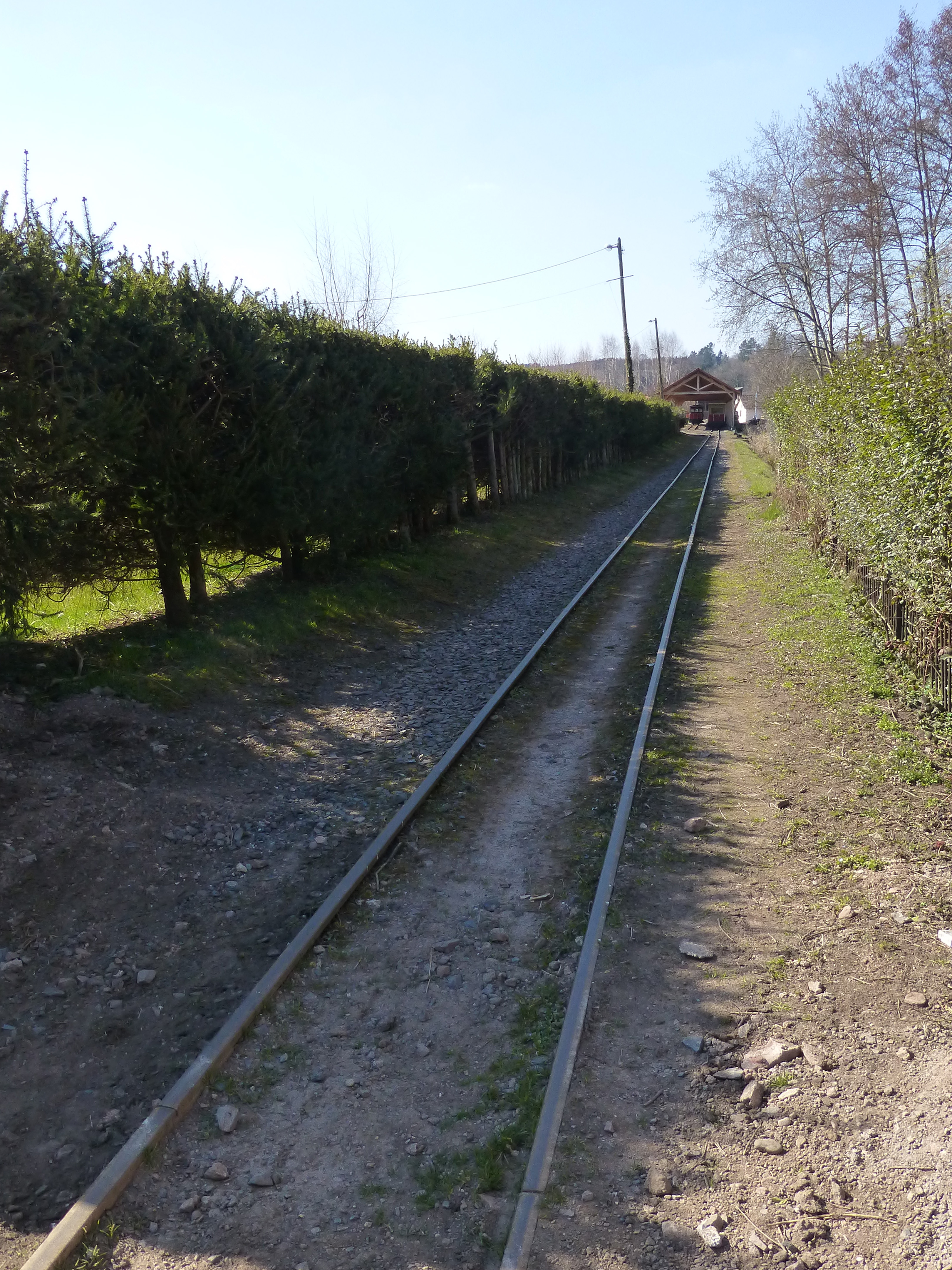 Rails du petit train d'Abreschviller (Moselle). Ecartement : 700 mm.